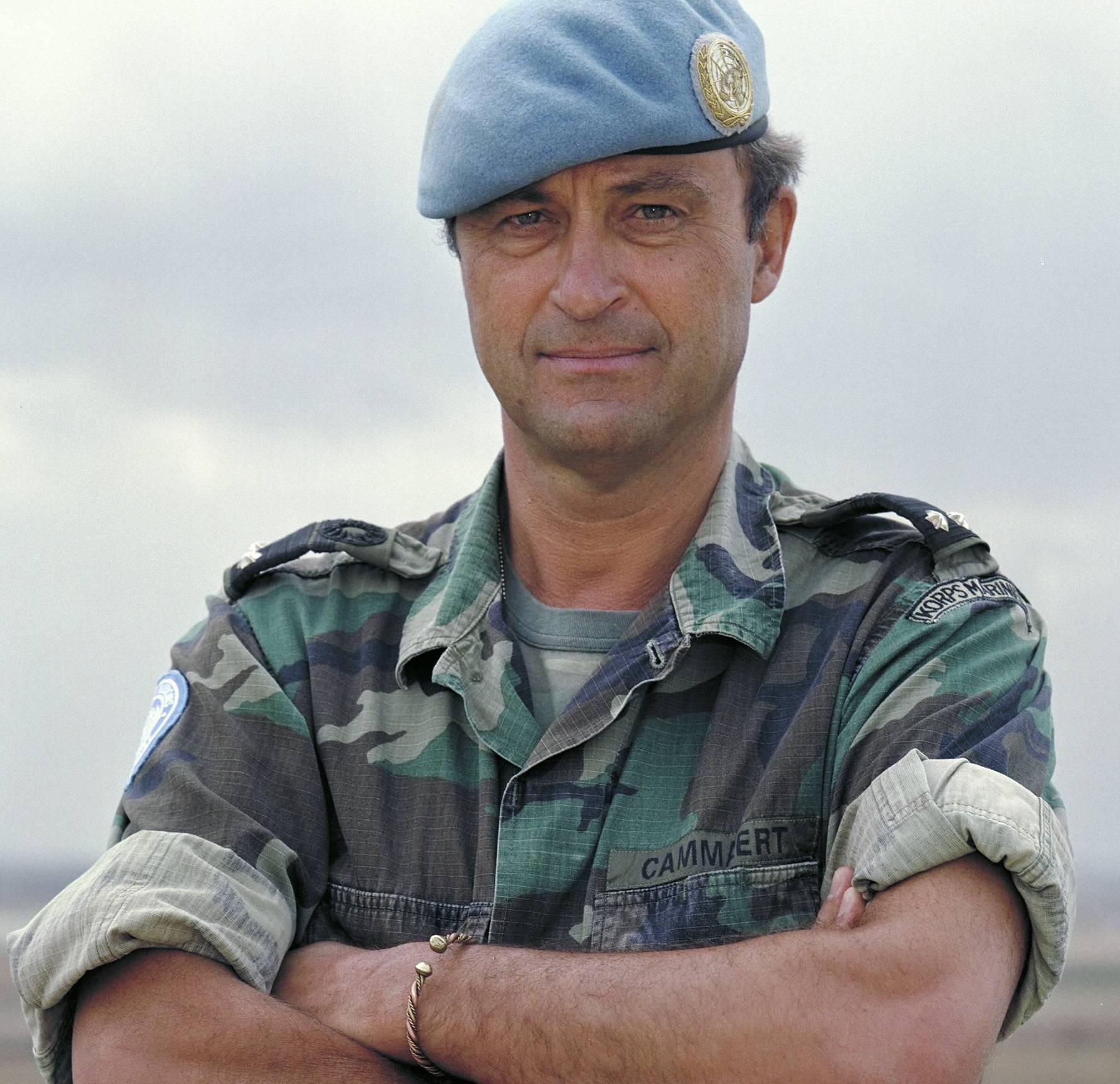 Patrick Cammaert is een Nederlands oud-marinier